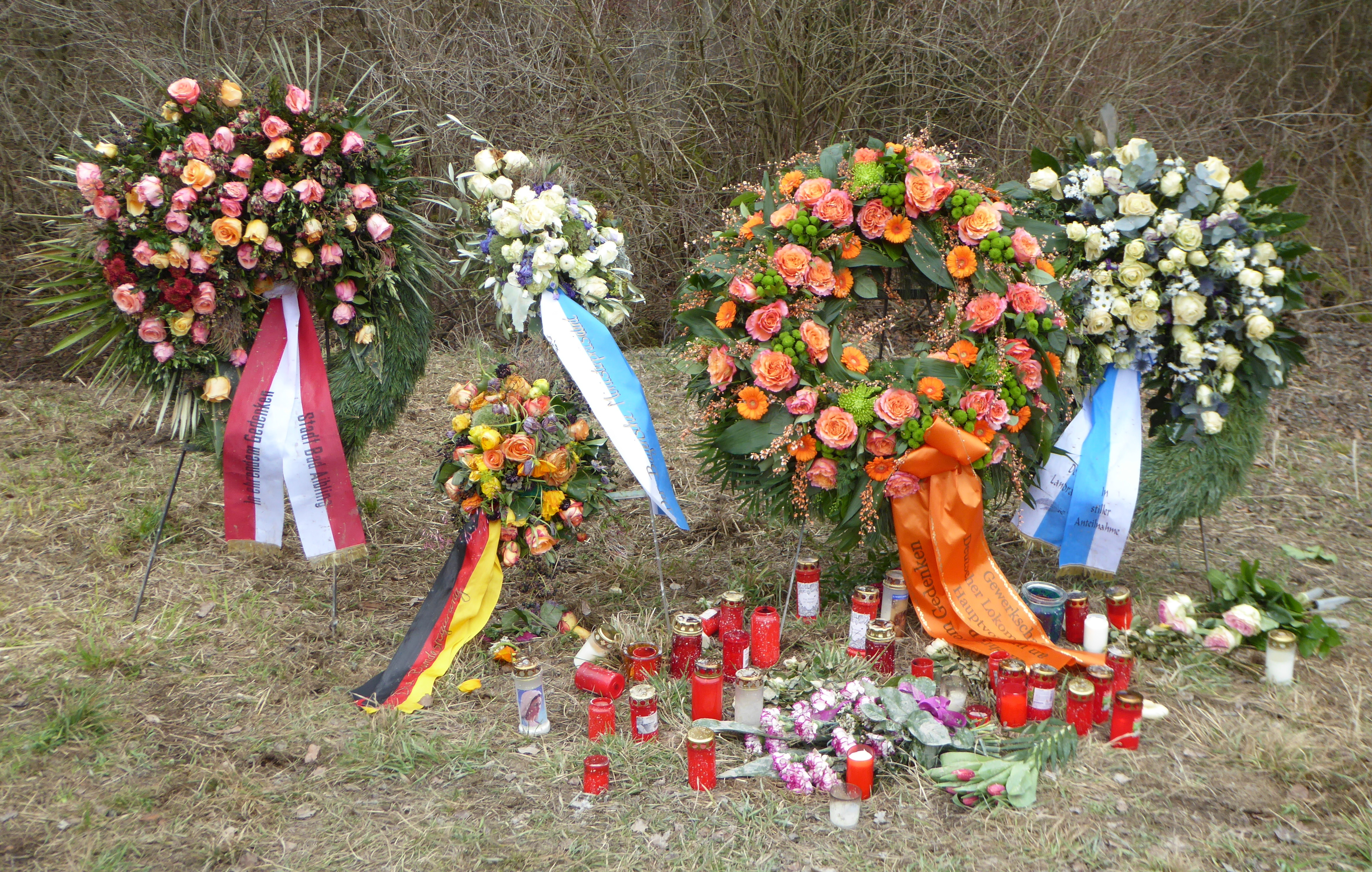 Trauerkränze für die Opfer des Zugunglücks vom 2016-02-09 bei Bad Aibling, von der Stadt Bad Aibling, der bayerischen Regierung, darunter der Bundesregierung, der GDL und dem Kreis Rosenheim. Der Kranz von der GDL ist gegenüber dem 2016-02-13 hinzugekommen. Die Bayerische Oberlandbahn hat ihren Kranz an der Mariensäule im Zentrum von Bad Aibling abgelegt.